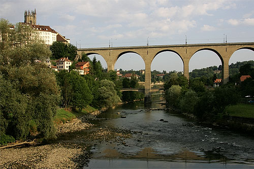 Fribourg / Freiburg: Pont de Zaehringen über der Sarine